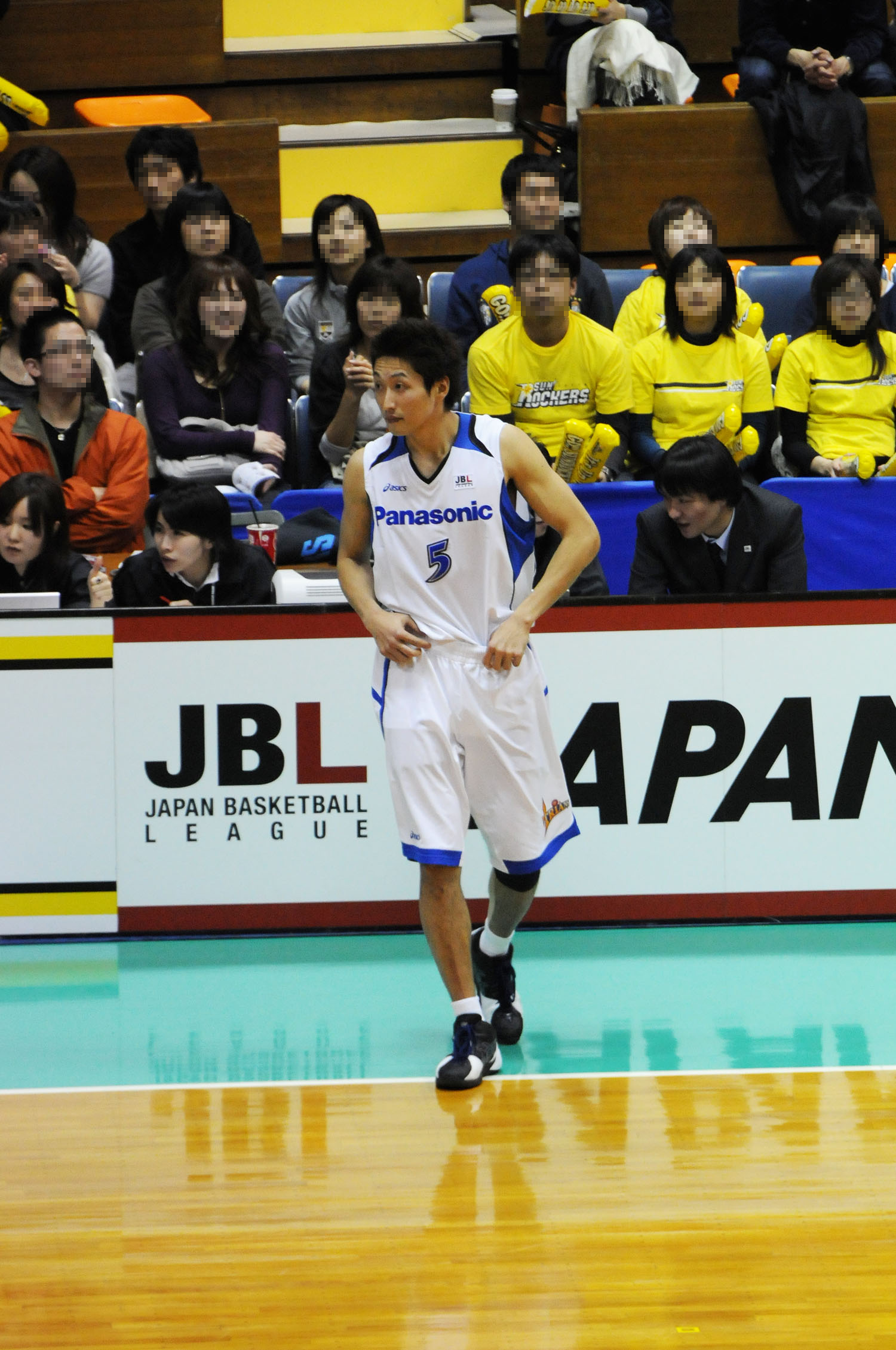 パナソニックトライアンズ、大野篤史選手。代々木第二体育館で。